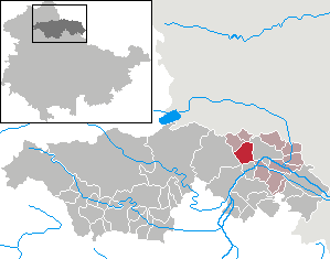 Ringleben in Thuringia - Kyffhäuserkreis